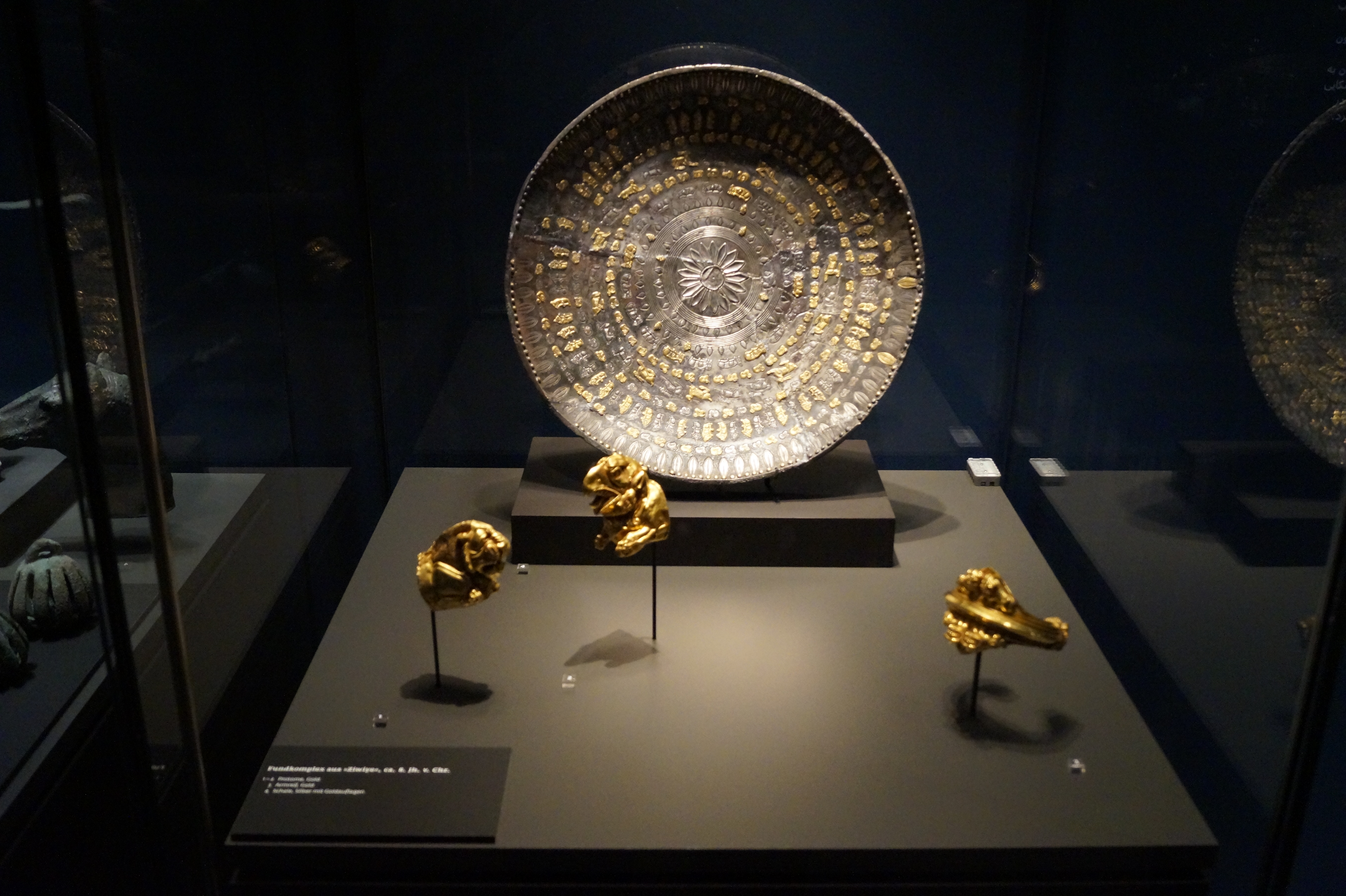 Die Ausstellung "Iran. Frühe Kulturen zwischen Wasser und Wüste" in der Bonner Kunst- und Ausstellungshalle der Bundesrepublik Deutschland zeigte vom 13. April bis 20. August 2017 Kunstgegenstände der iranischen Kulturen der Frühzeit, vom 7. bis ins 1. Jahrtausend v. Chr., und gab einen Einblick in auf eine in Europa wenig bekannte Bildwelt aus einem über Jahrzehnte verschlossenen Land.